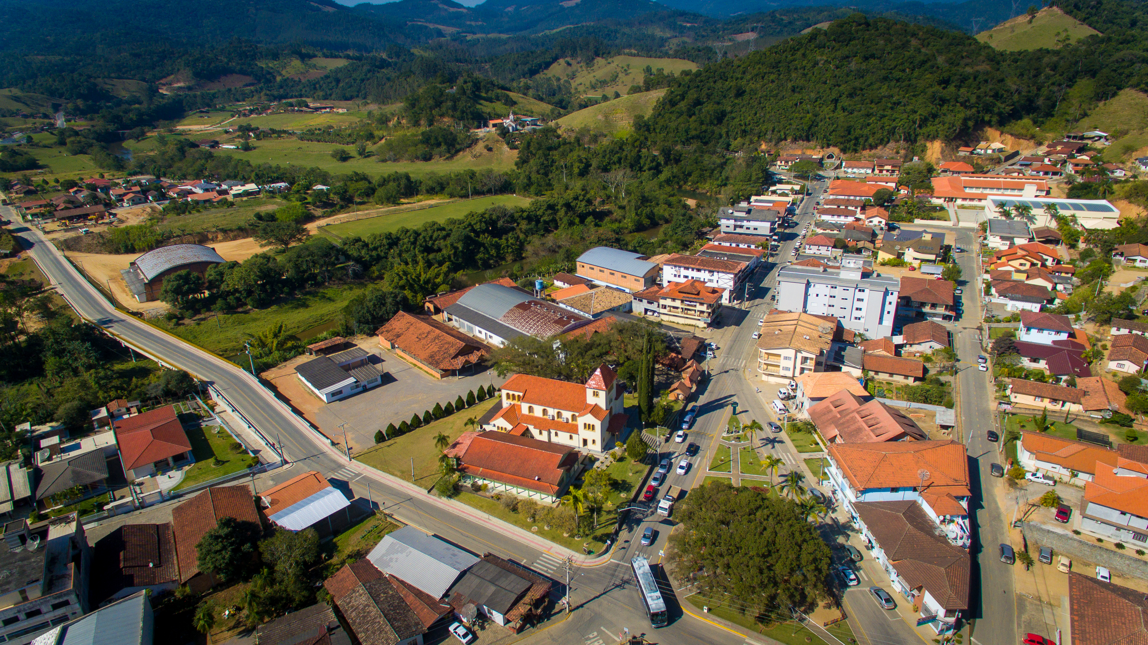 Fotografia aérea